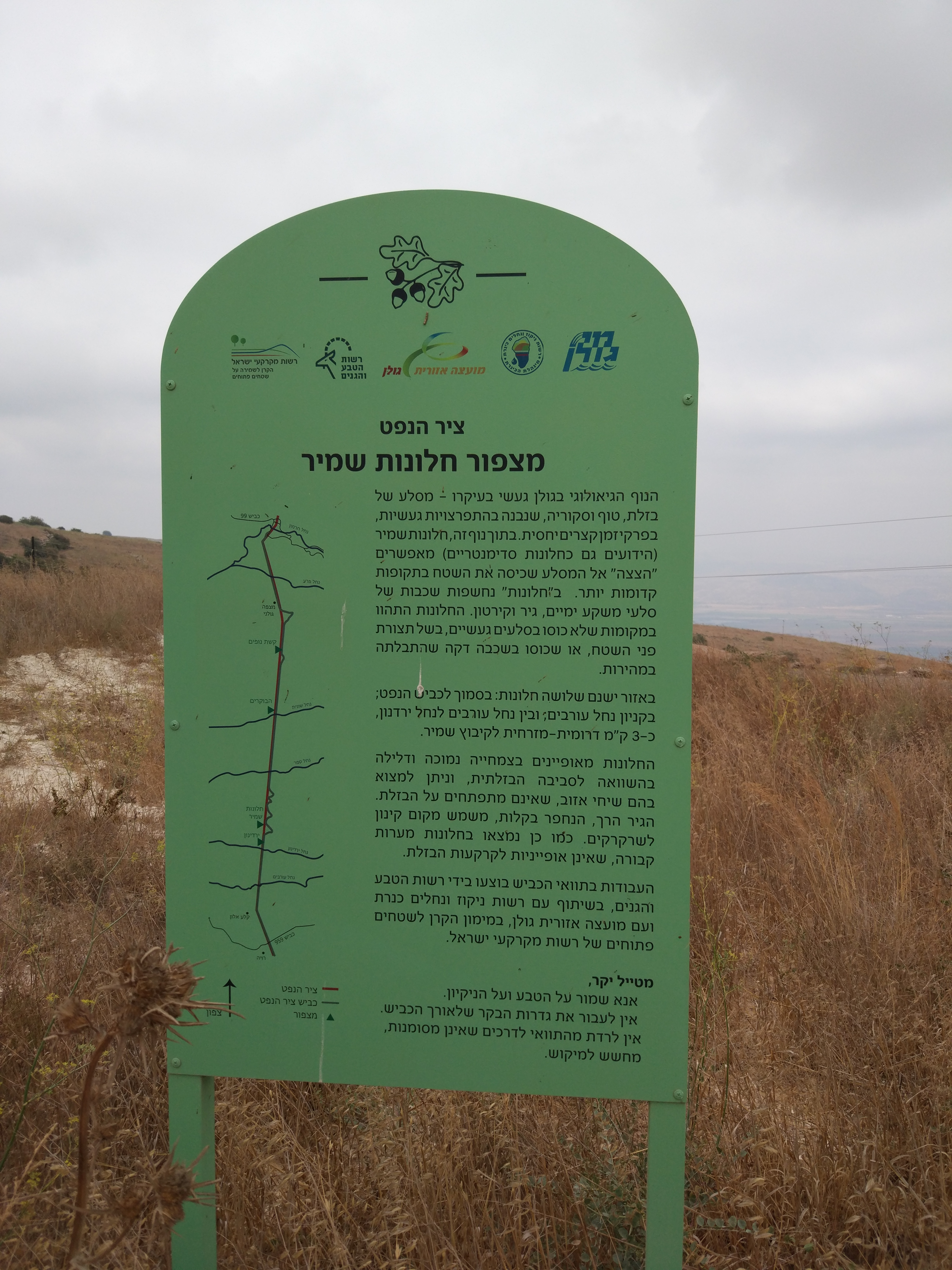 שלט במצפור חלונות שמיר בקטע הכביש המשוקם